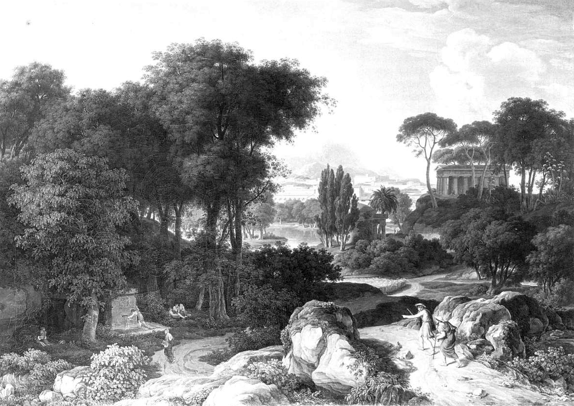 Griechische Ideallandschaft von Gottlob Friedrich Steinkopf, 1809, 1937 von der Berliner Nationalgalerie erworben, im Krieg zerstört.